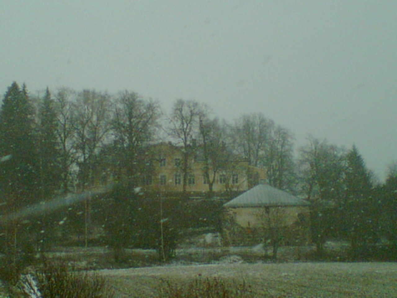 Raala manor house [03-2007]